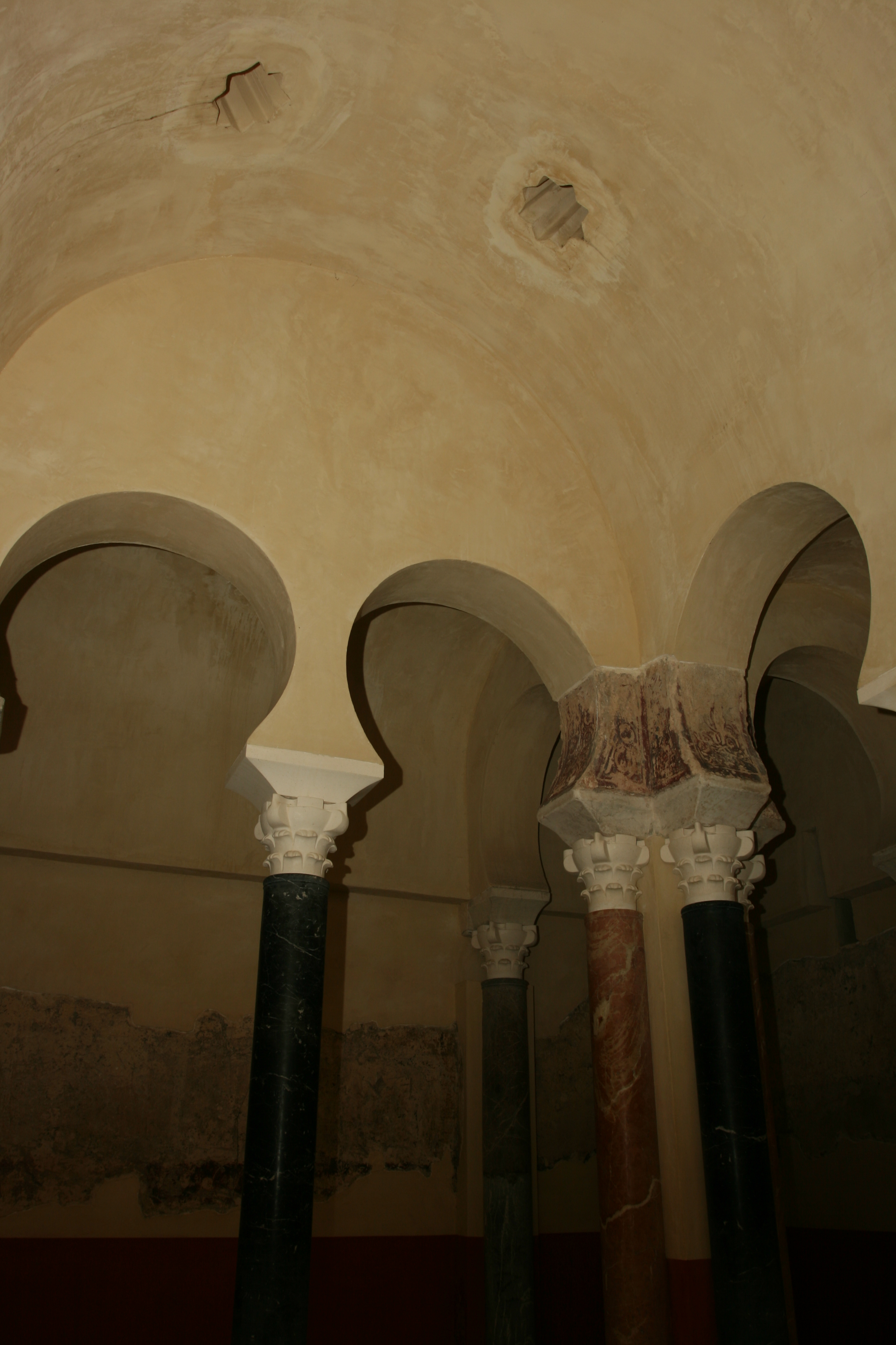 Baños Califales, Córdoba (España).